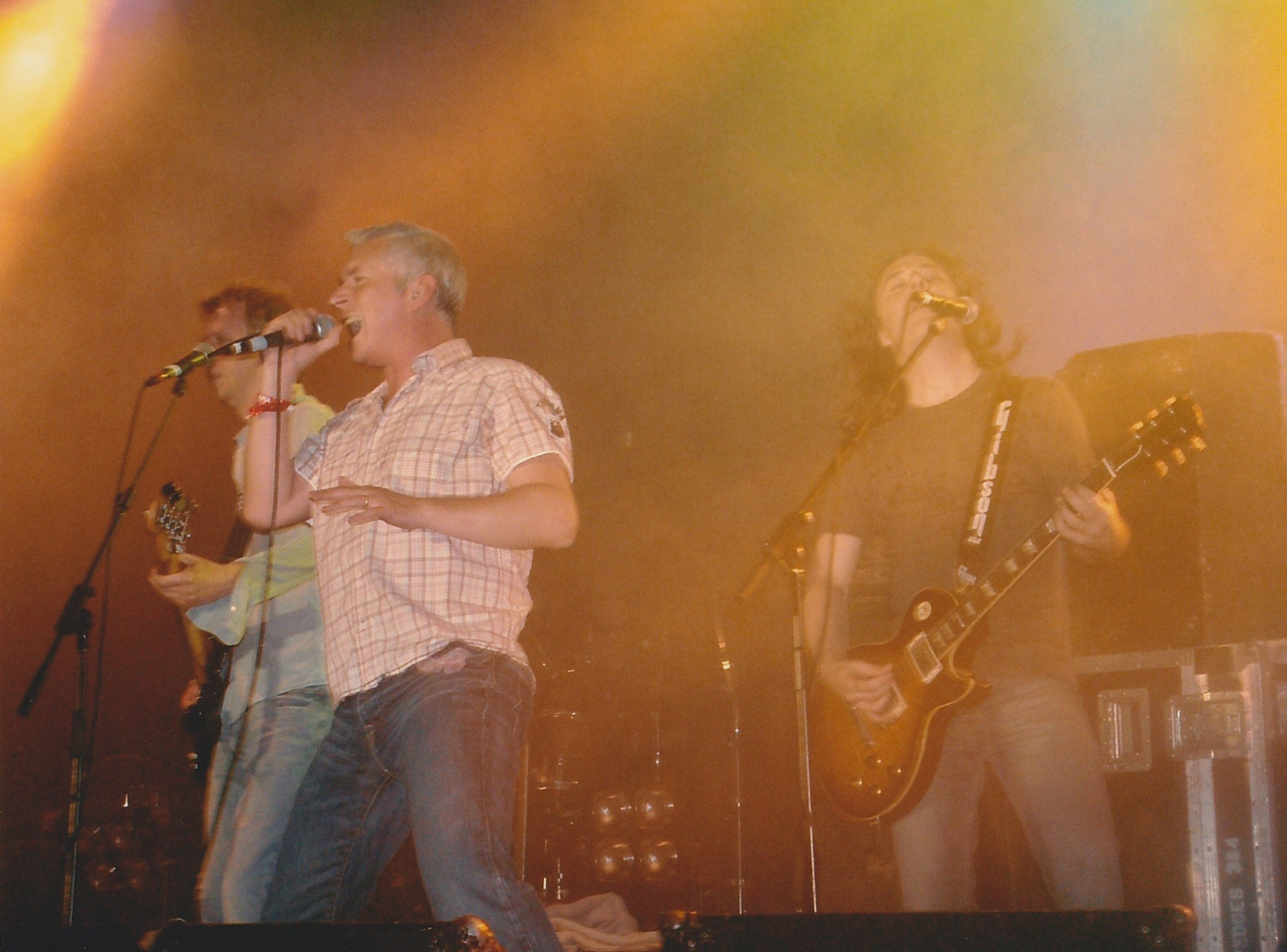 Thunder, Guilfest 2005